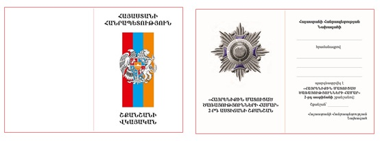 «Հայրենիքին մատուցած ծառայությունների համար» 2-րդ աստիճանի շքանշանի վկայական